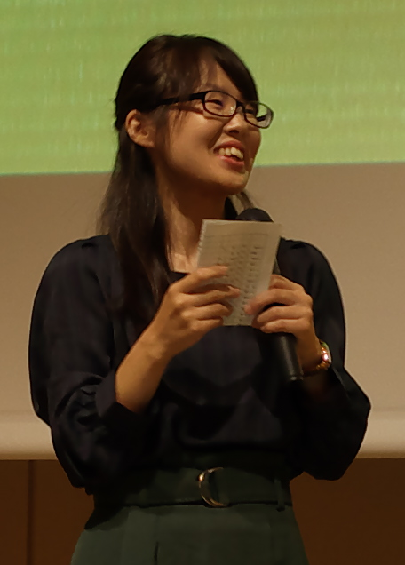 貞升南女流初段。2018年10月2日、第66期王座戦五番勝負第3局 大盤解説会にて。